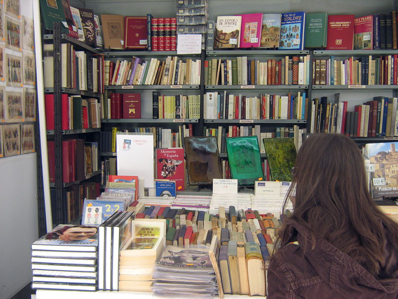 Casetas de la Feria del Libro Antiguo y de Ocasión de Madrid. La fotografía se corresponde con la edición número 32 del evento.